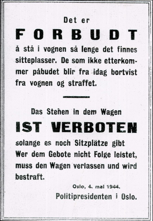 Mange av sporveiens passasjerer foretrakk å stå elller bytte plass framfor å sitte ved siden av meldemmer av hirden eller tyske soldater. Dette ønsket NS-myndighetene å få slutt på og slo derfor opp denne og lignende plakater i Sporveiens vogner.